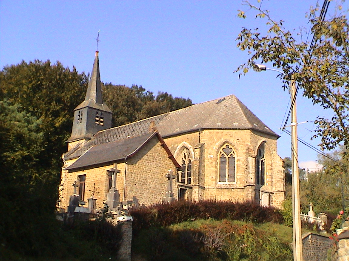 Eglise de Questrecques